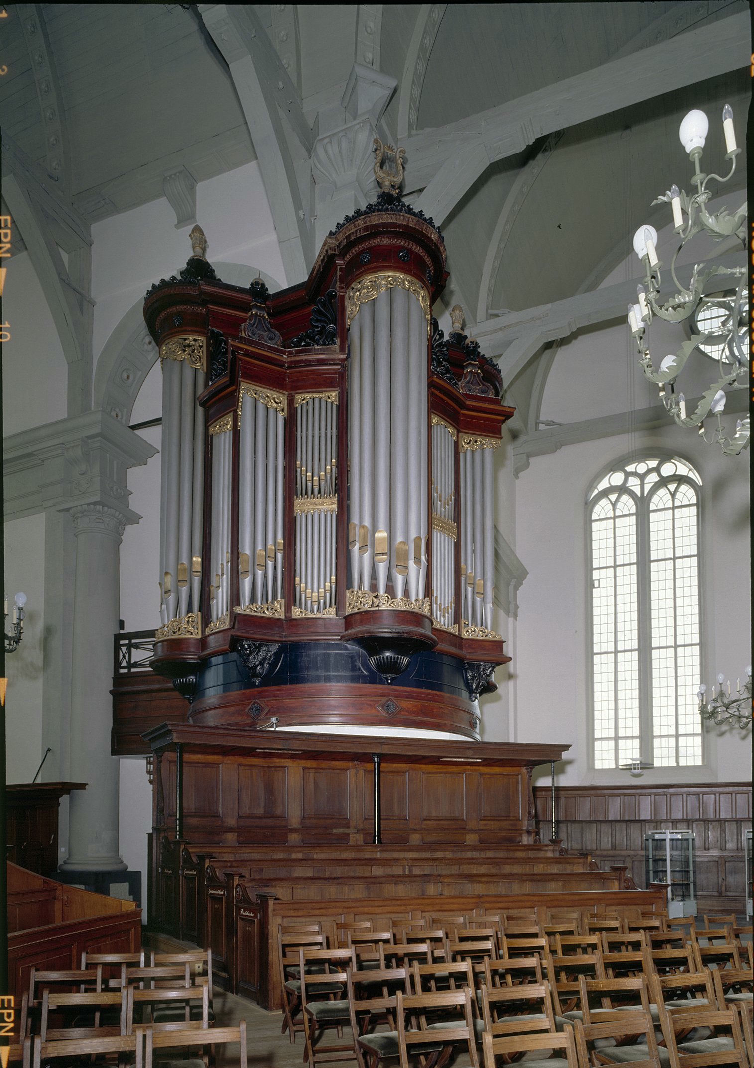 Hervormde Noorderkerk: Interieur, aanzicht orgel, orgelnummer 63 (opmerking: Gefotografeerd voor Het Historische Orgel in Nederland 1840-1849)